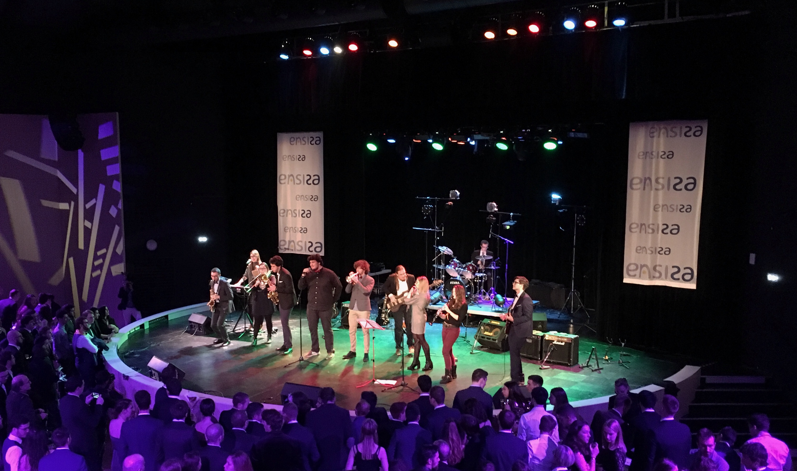 un des groupes musicaux de l'ENSISA anime la soirée de gala 2019